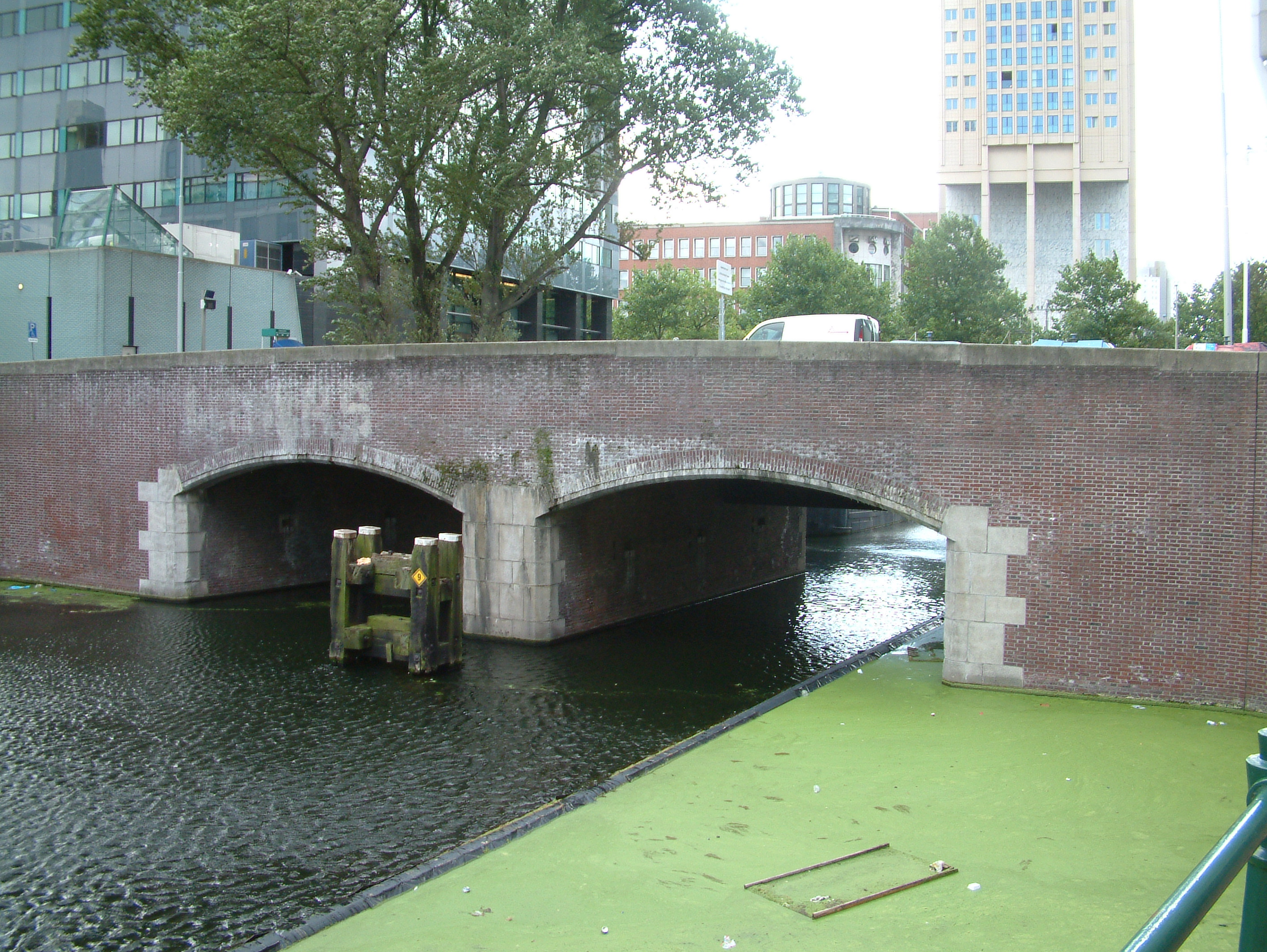 Bruggen over de Rotte, De Soetenbrug, noordkant